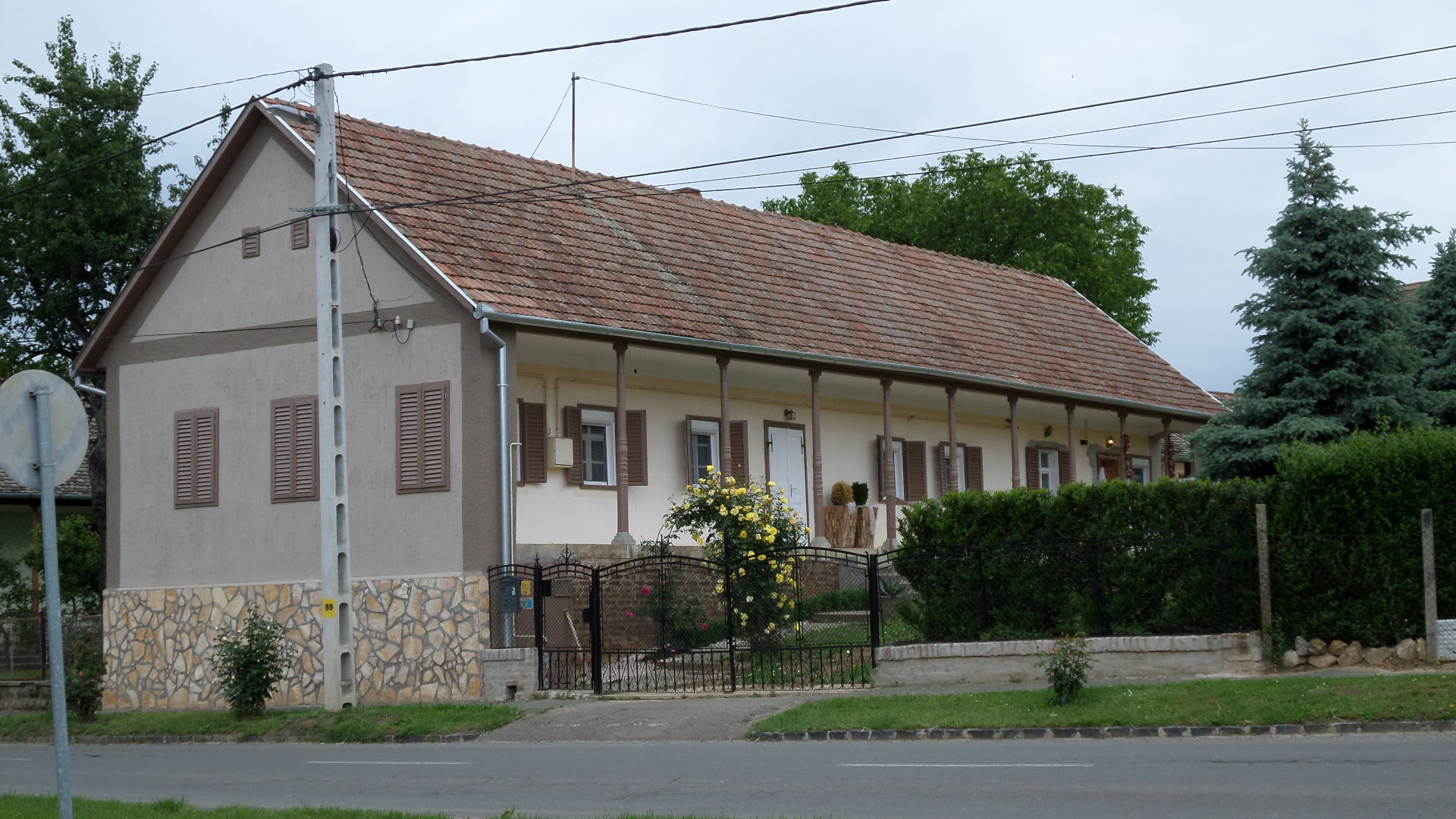 Egy eredeti formáját megőrzött, jellegzetes német paraszház , alatta pincével.